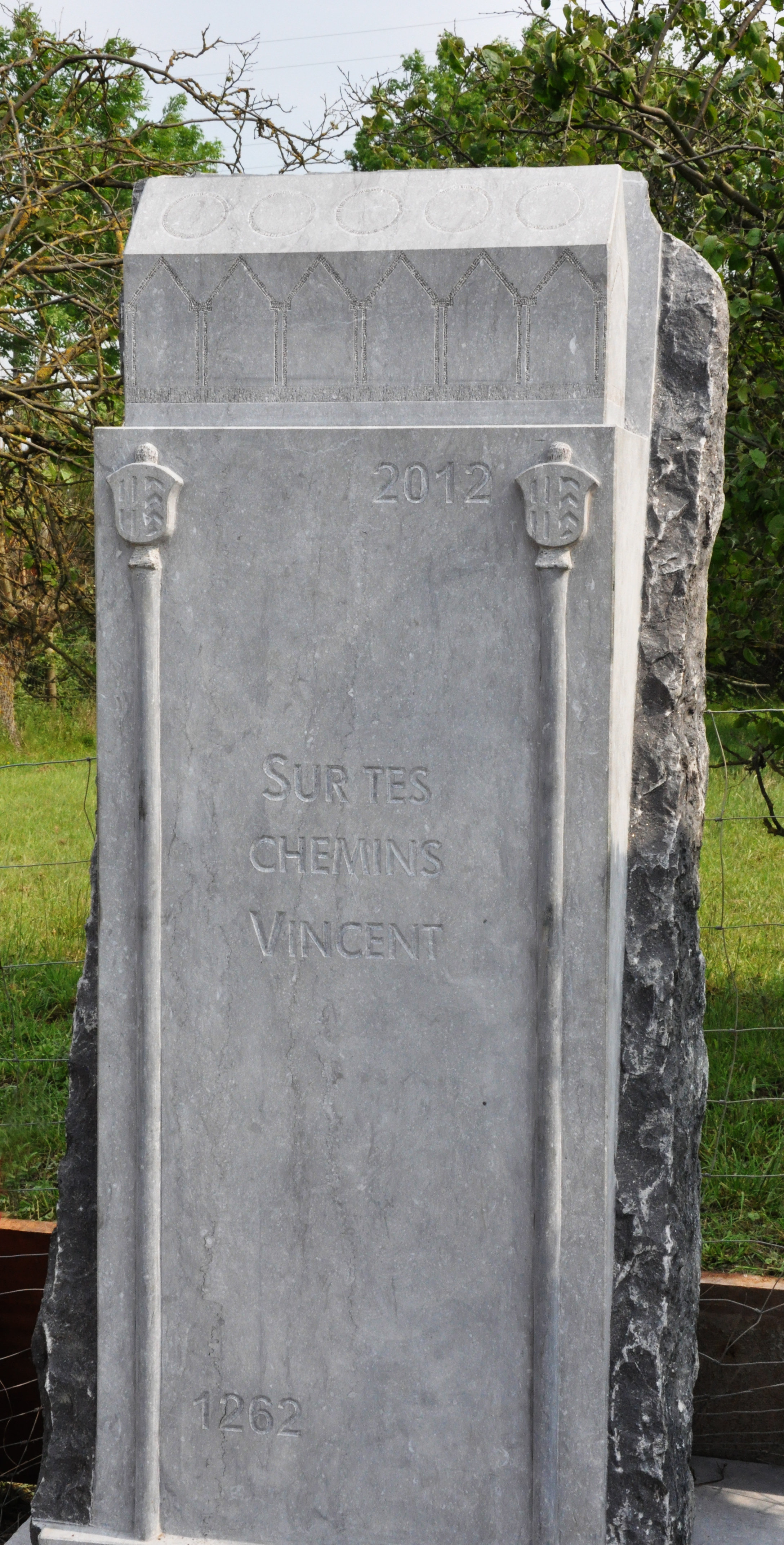 Chapelle réalisée à l'occasion du 750ème anniversaire de la première mention connue du Tour Saint Vincent de Soignies.